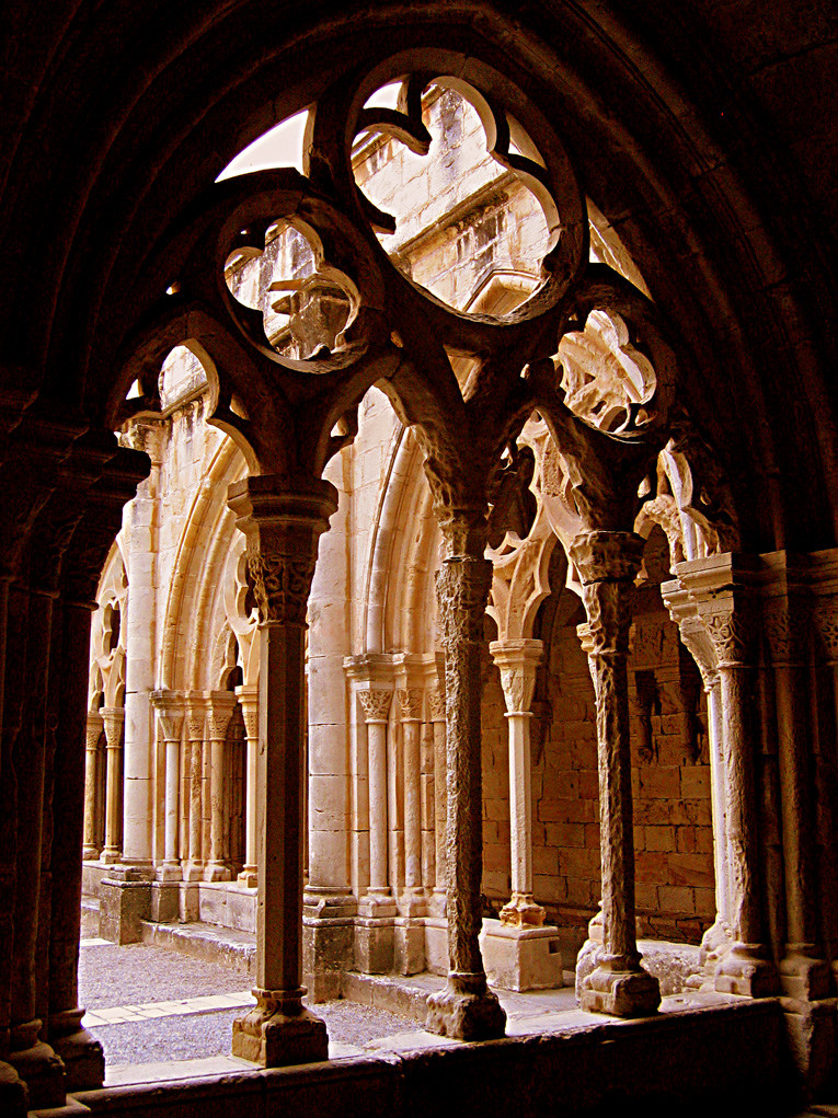 Arcos de los pasadizos del patio central del monasterio de Poblet.Arcos de Poblet.